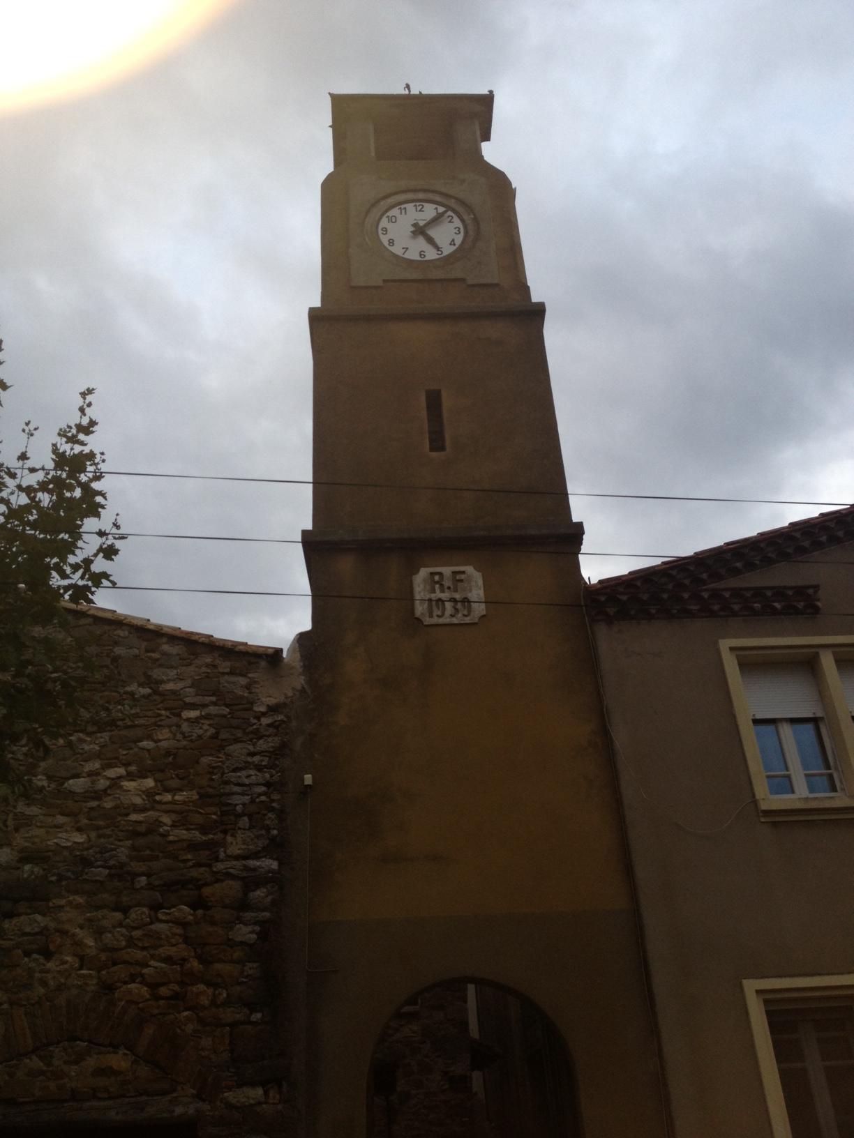 Tour de l'horloge à Monze